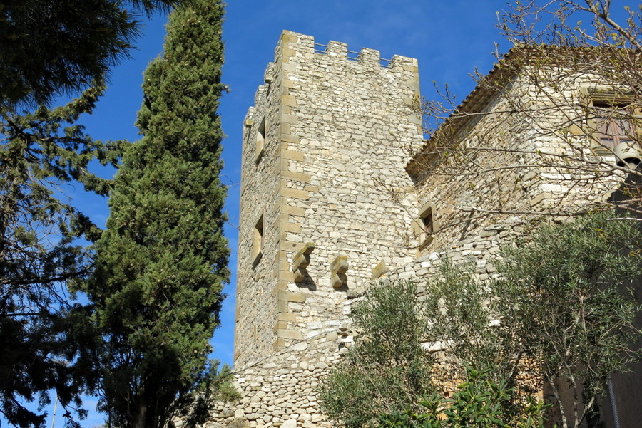 Castell de Curullada (Segarra) - Catalunya